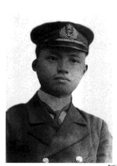 中文（台灣）: 光緒三十四年在大阪高等工業學校造船機械專業學習